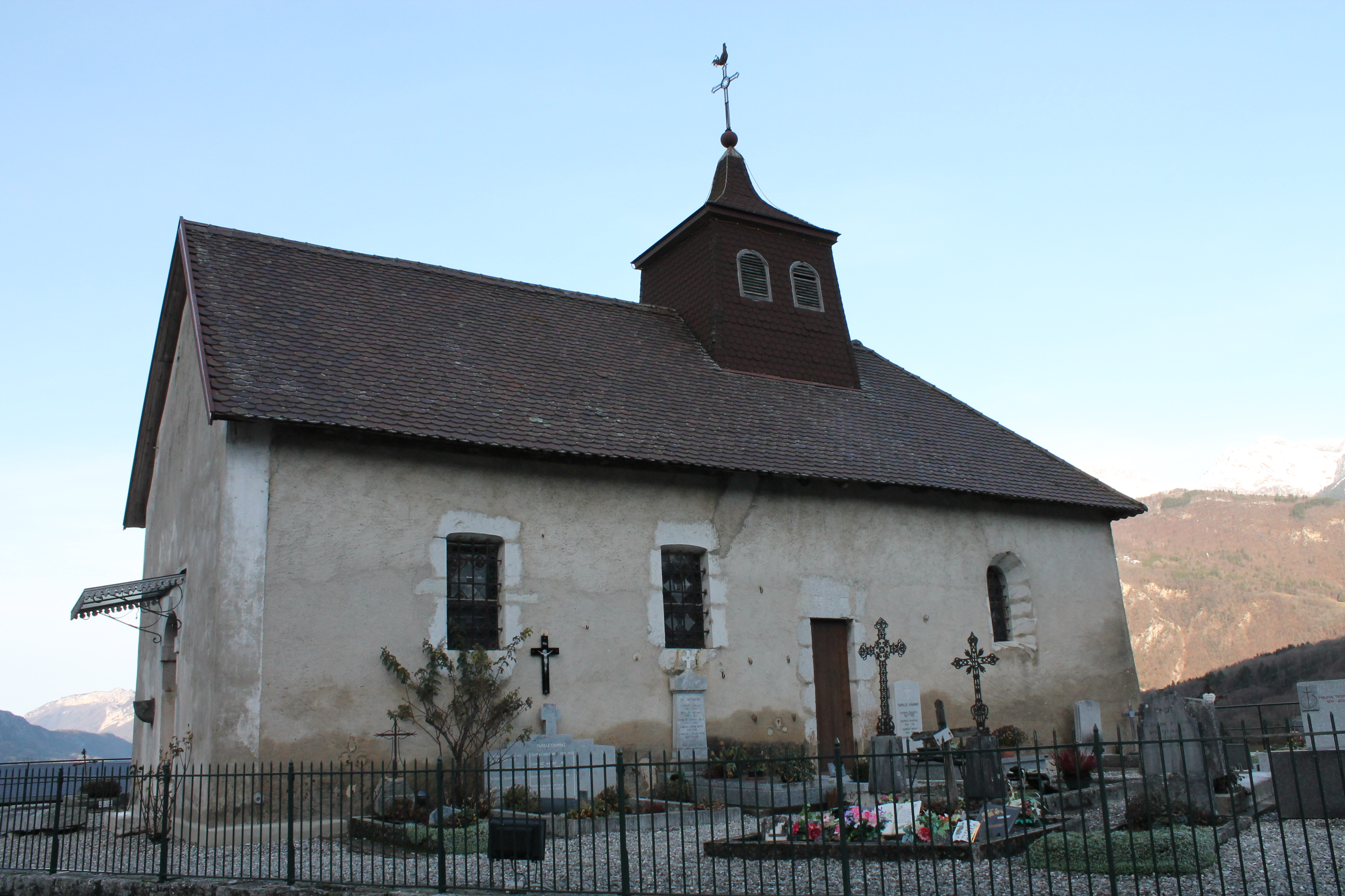 Église Saint-Martin de Chevaline, au premier plan le cimetière communal.